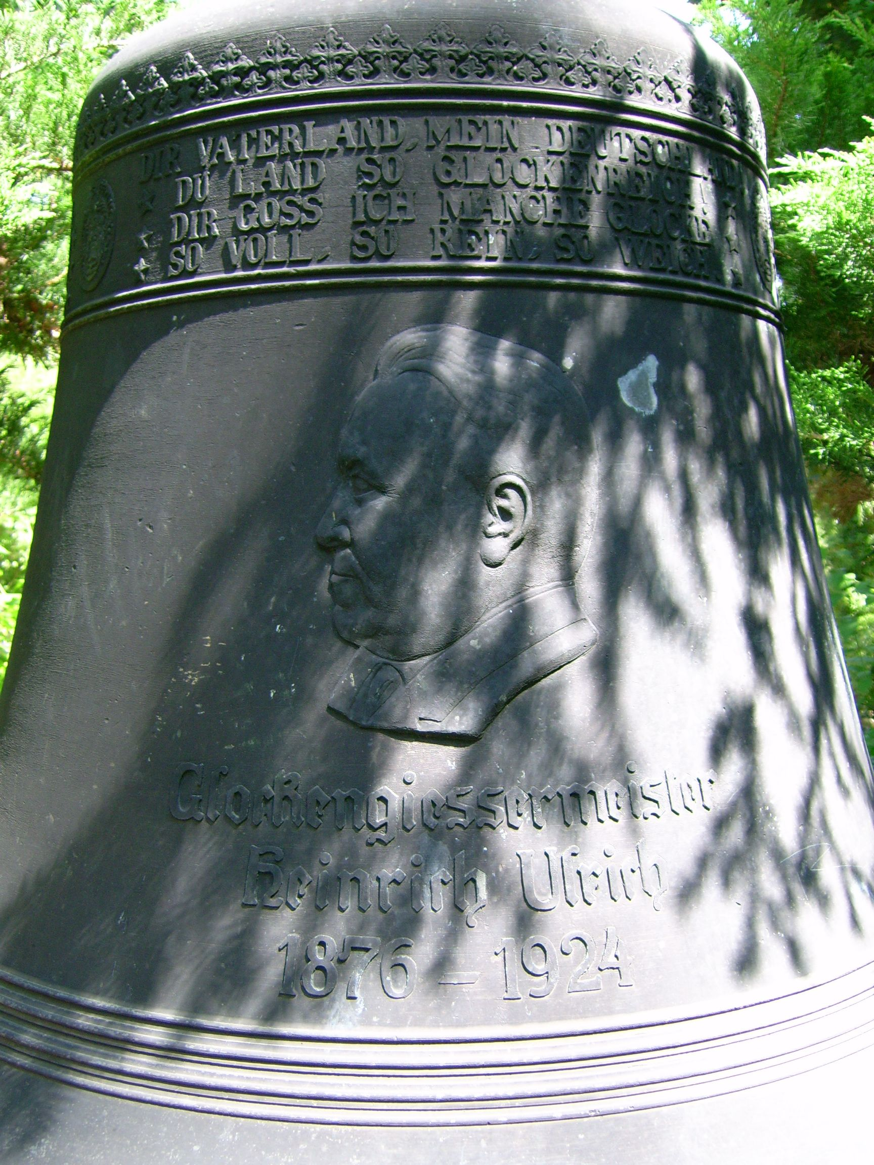 Grab Ulrich detail